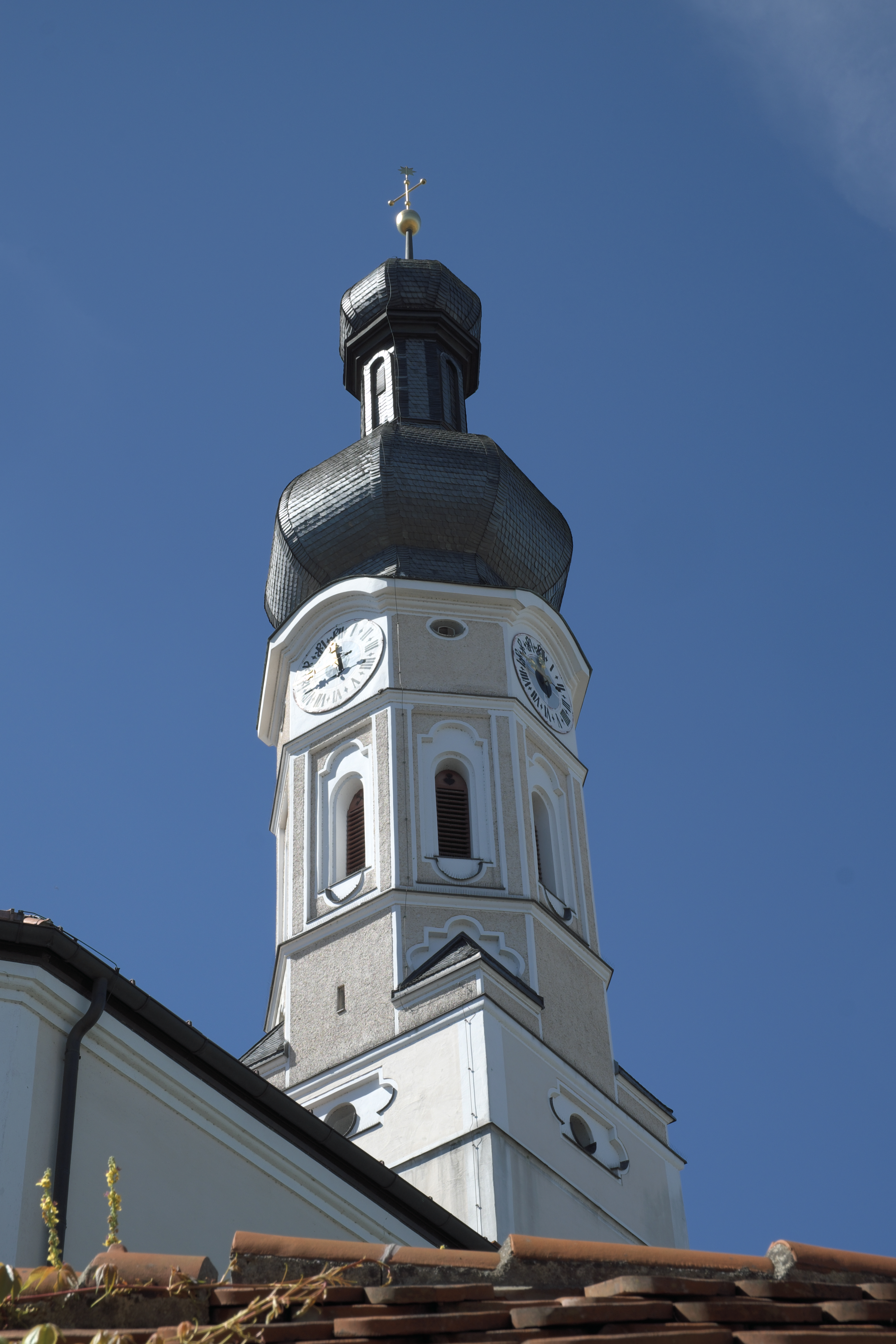 Katholische Pfarrkirche St. Johannes Baptist in Inning am Ammersee im Landkreis Starnberg (Bayern/Deutschland), Glockenturm